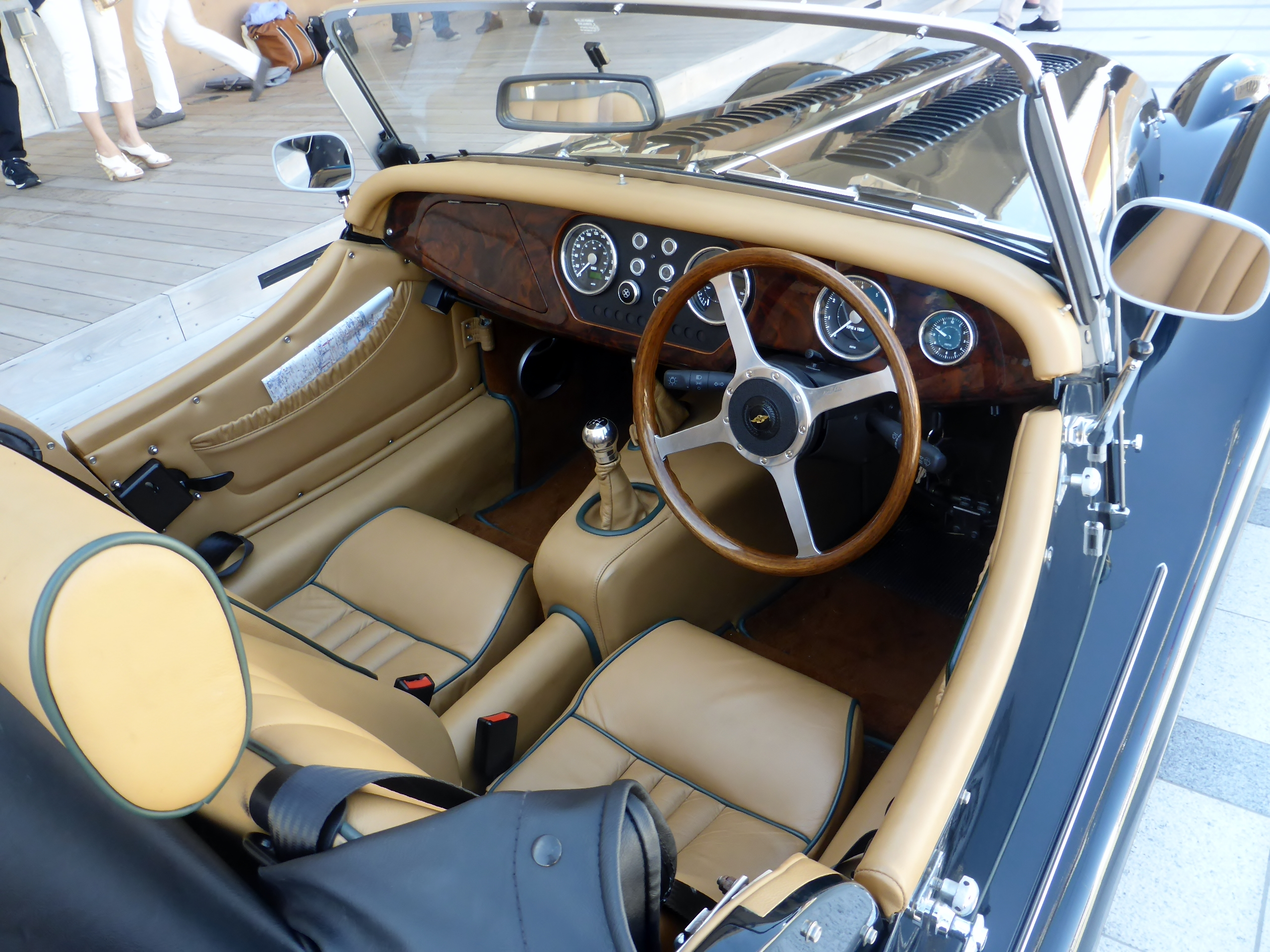 モーガン+8のインテリアを撮影。